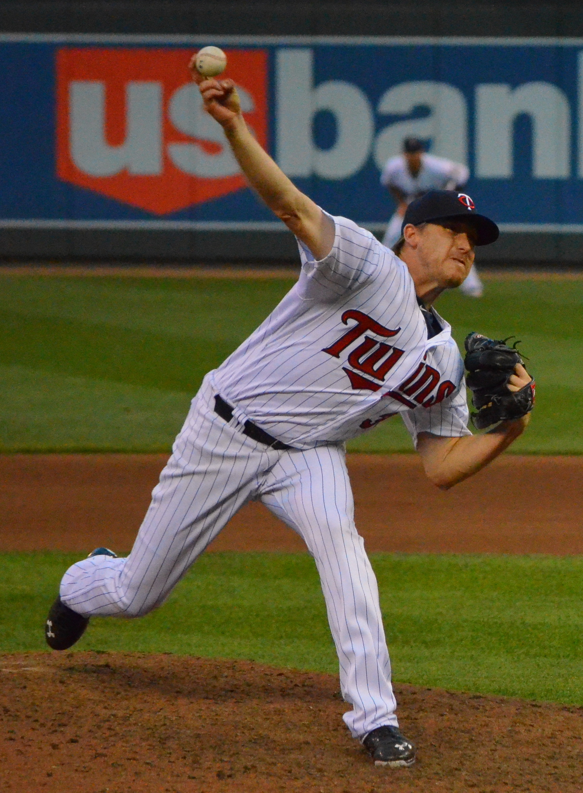 Kevin Correia